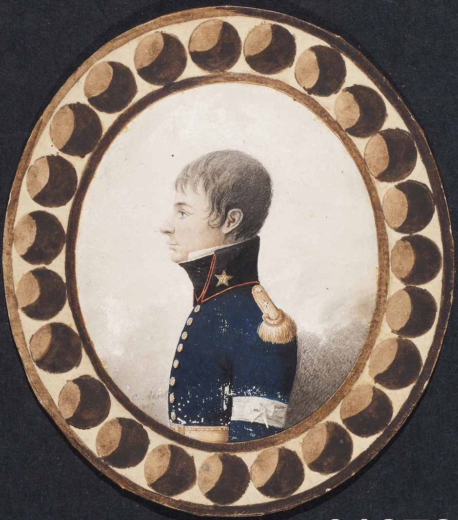 Självporträtt av Carl Fredrik Akrell i uniform för en löjtnant vid fältmätningskåren. Signerad 'C. Akrel/1807.